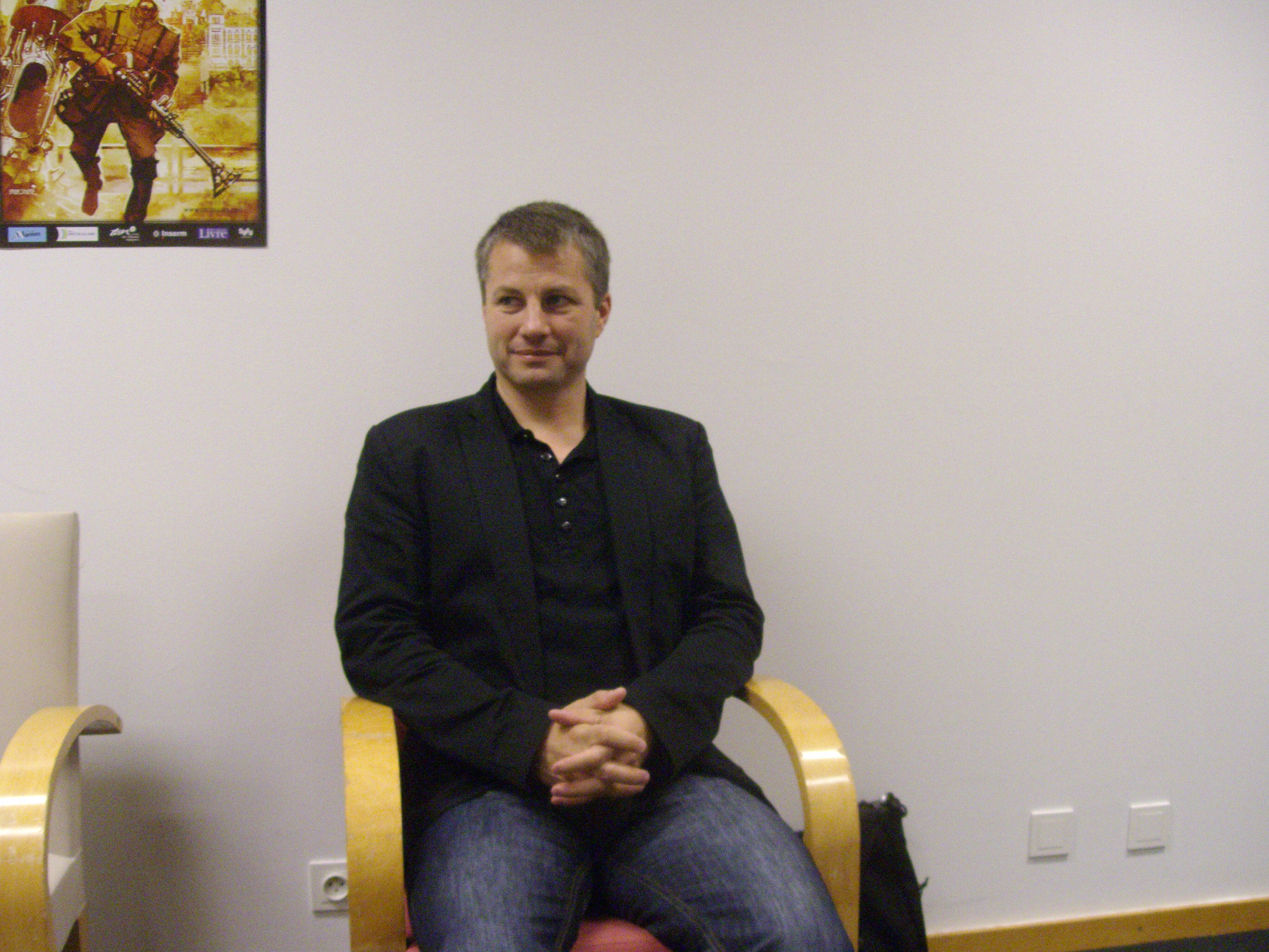 Erik L'Homme aux Utopiales 2011